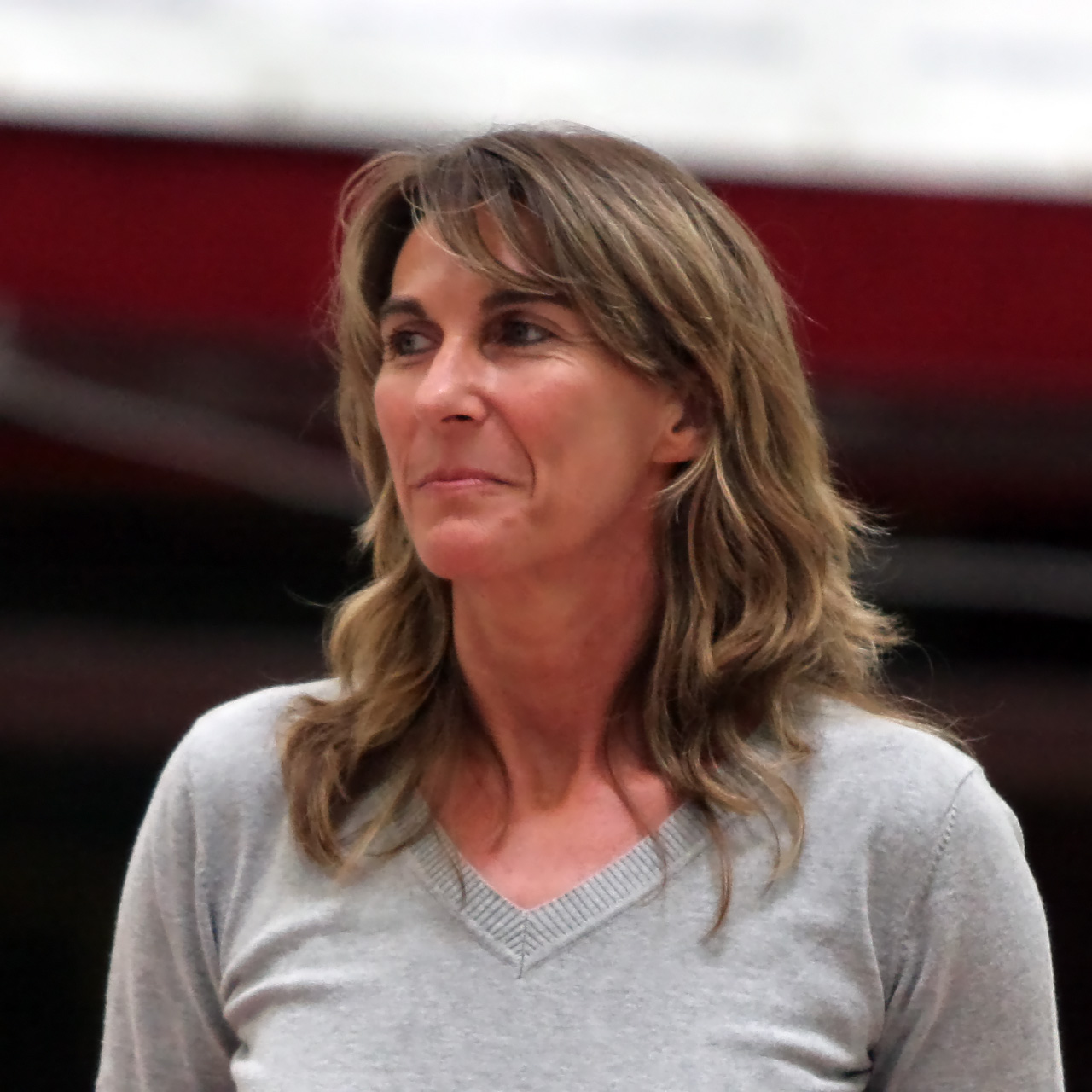 Silvia Schmitt, ehemalige Handball-Nationalspielerin (245 Länderspiele) und Handballerin des Jahres 1998, am 16. Mai 2009 in der Bensheimer Weststadthalle.